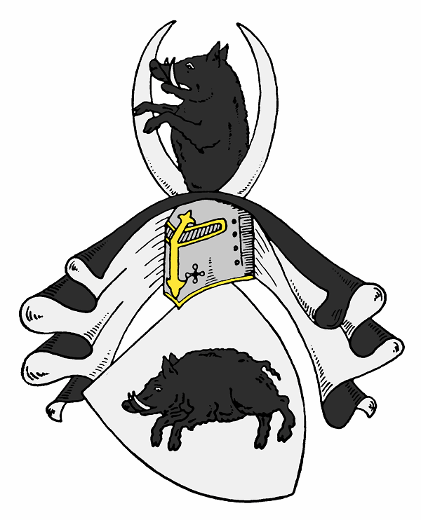 Stammwappen der von Bassewitz